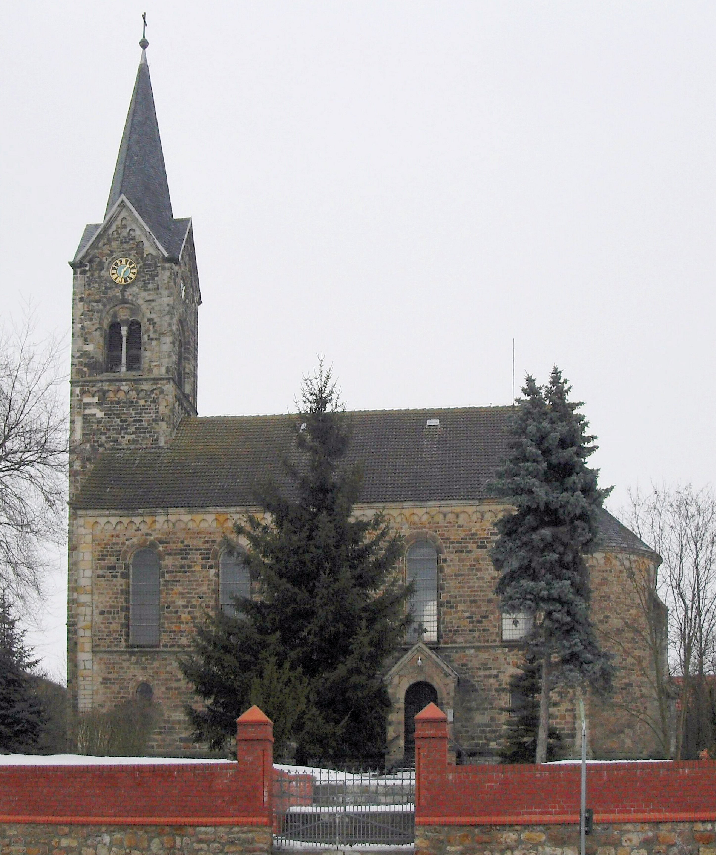 Kirche in Druxberge, Gemeinde Eilsleben, Landkreis Börde, Deutschland